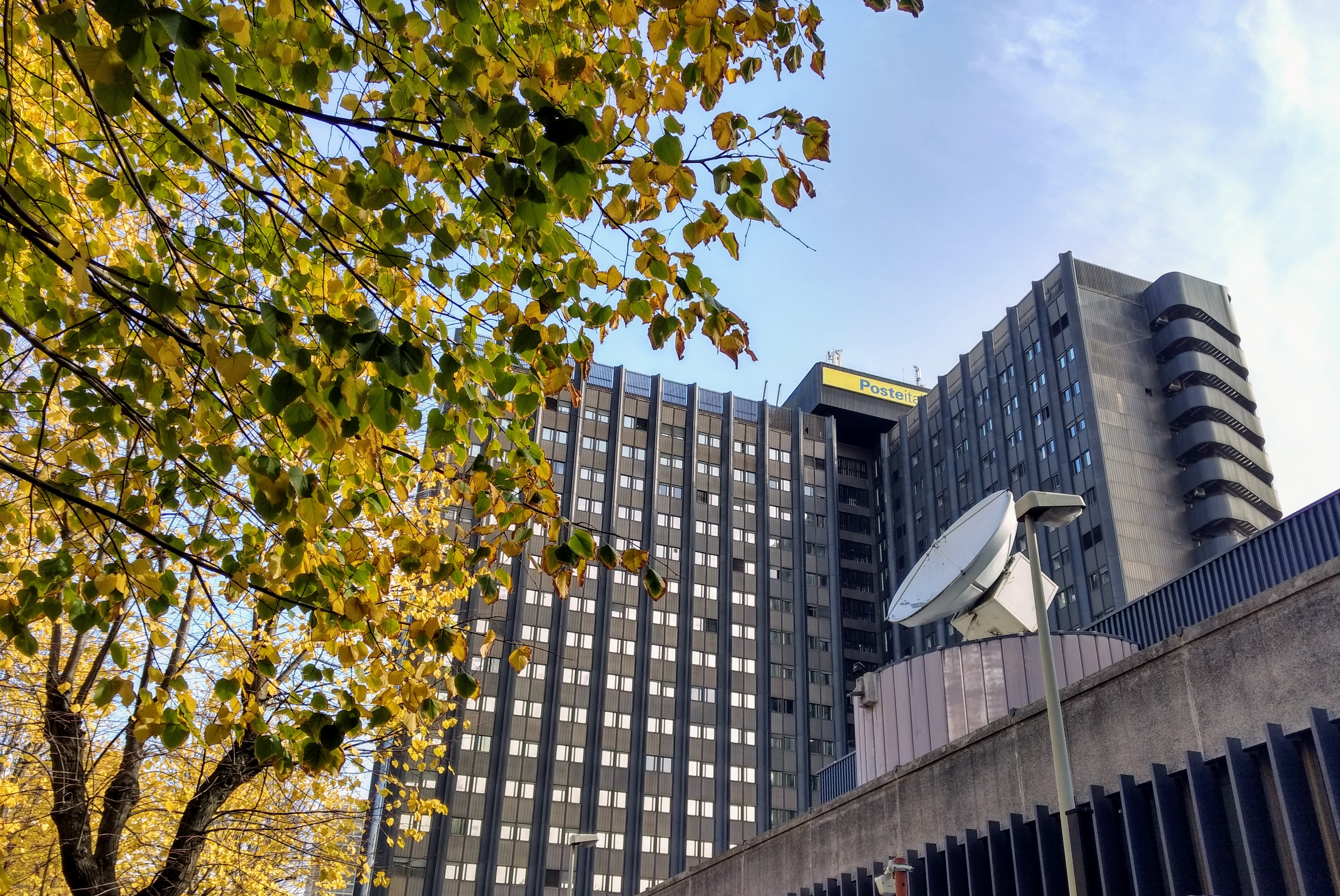 La torre delle Poste Italiane in Viale Europa, 190 a Roma